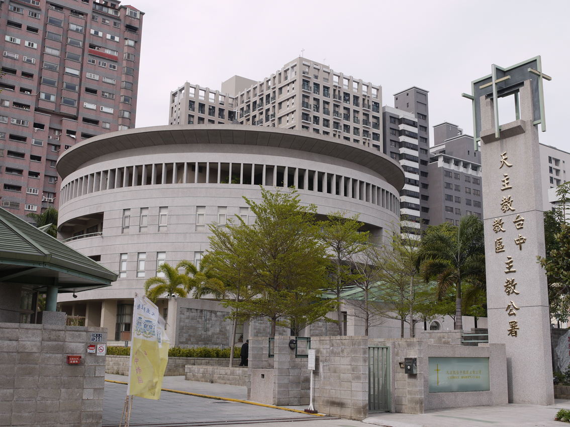 中文（台灣）: 天主教台中教區主教公署，地址：臺中市北區德化街368號。